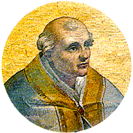 Pope Callixtus II